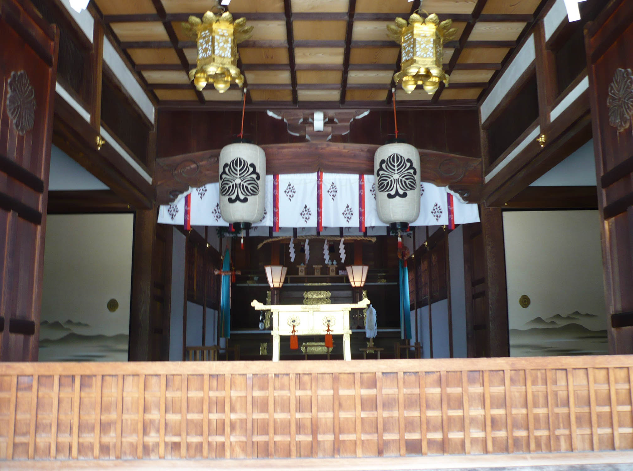 恵美須神社の本殿